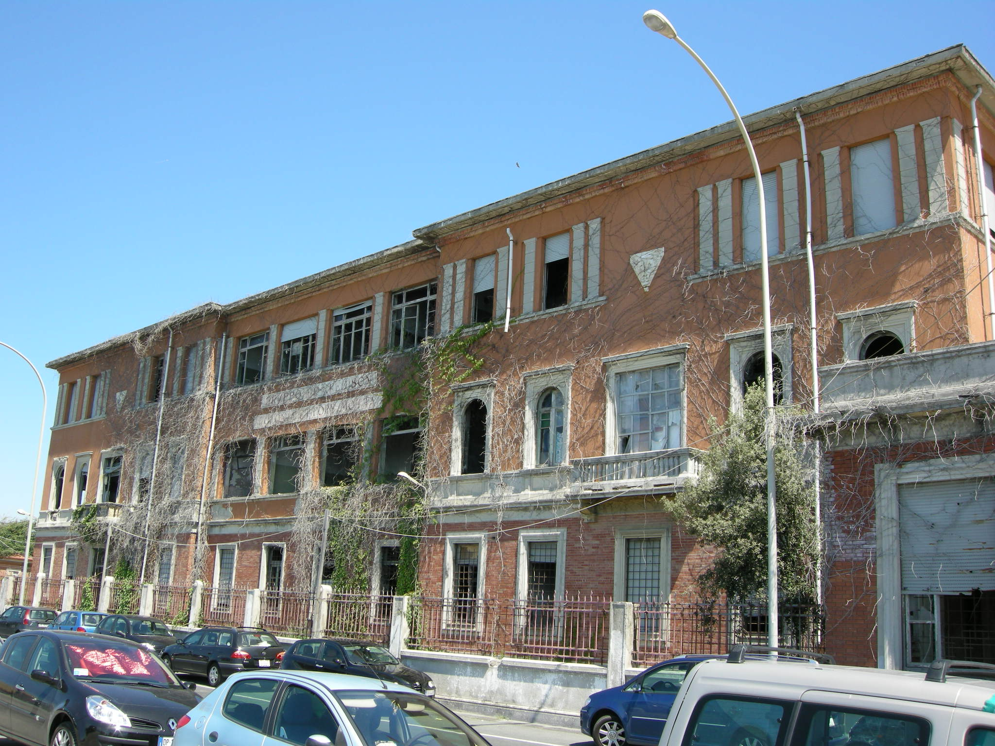 Colonia ettore motta